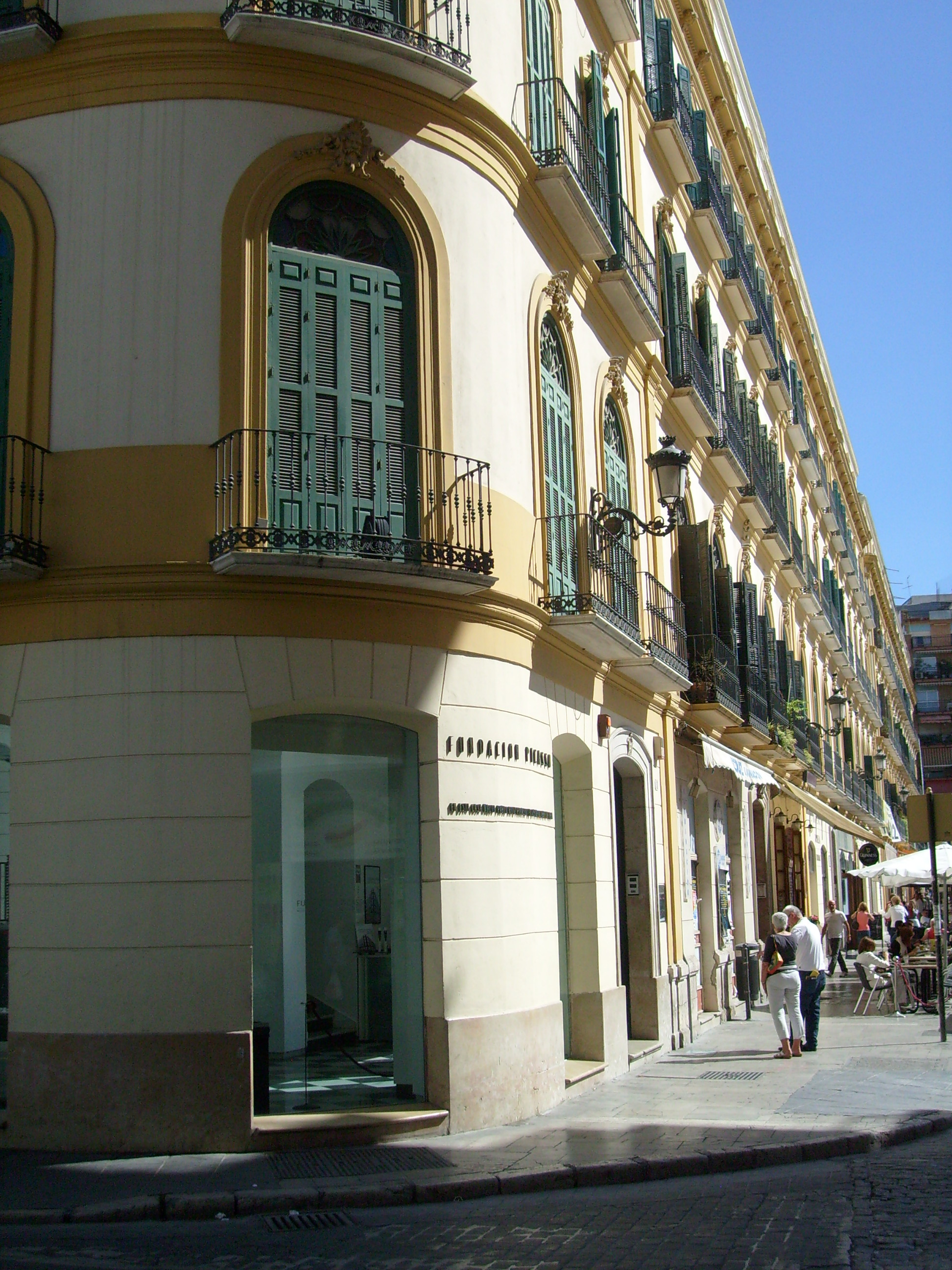 Fundación Picasso, Casa Natal. Málaga.